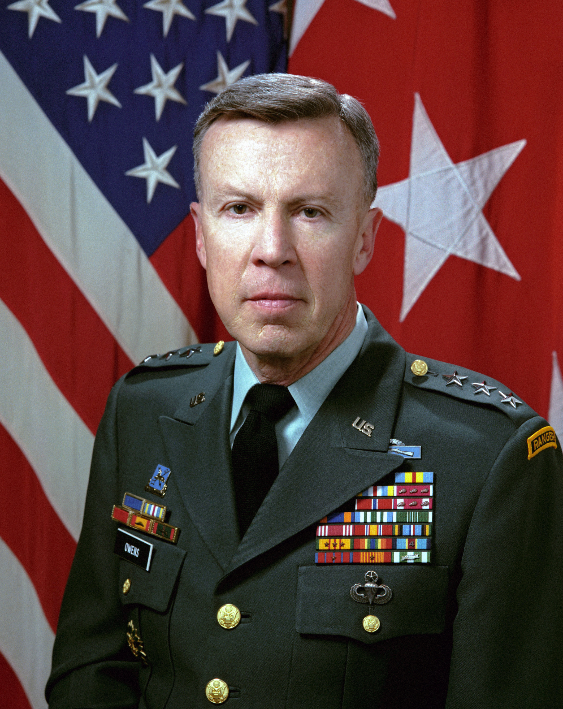 Lieutenant General Ira C. Owens